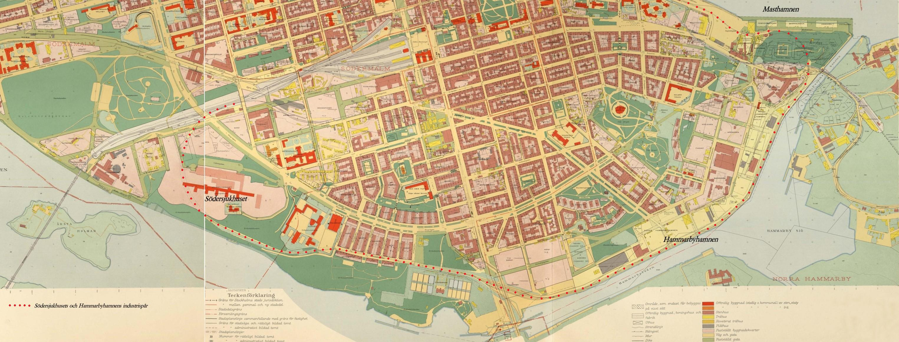 Södersjukhusets och Hammarbyhamnens industrispår